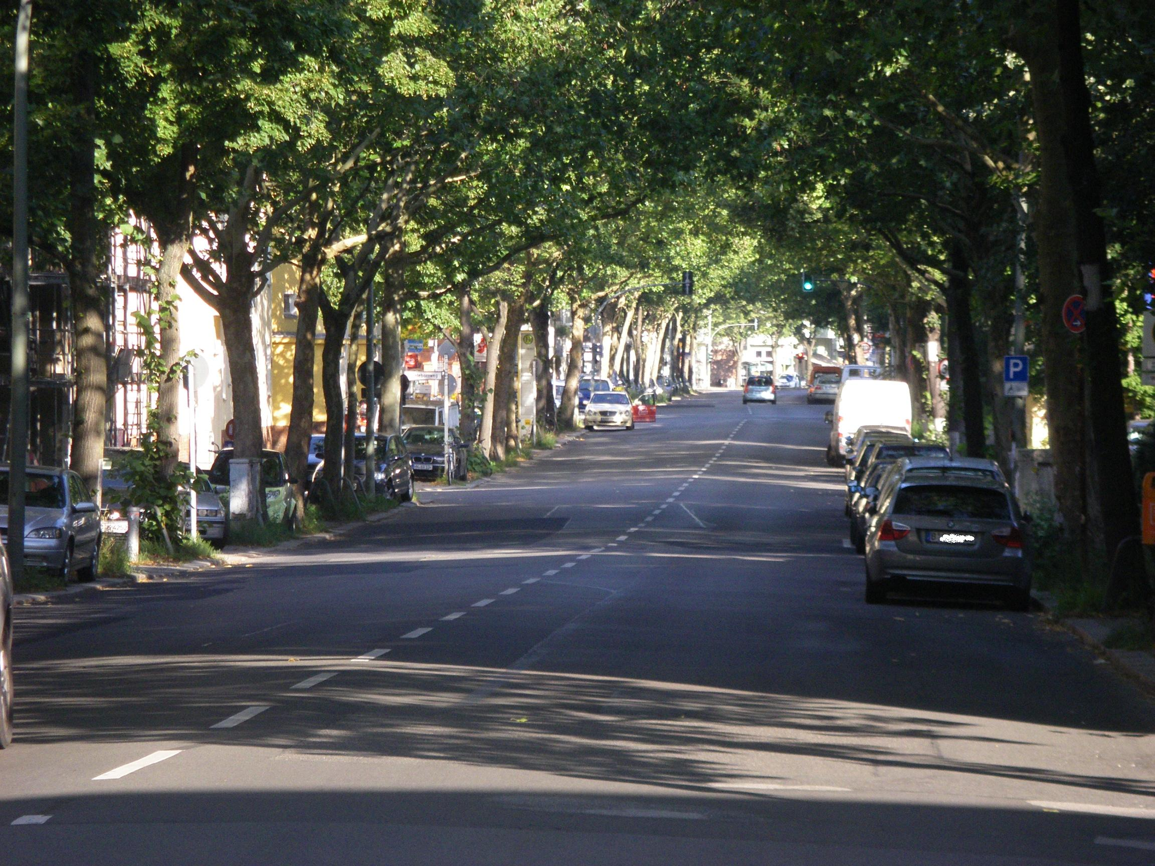 Berlin-Steglitz Birkbuschstraße